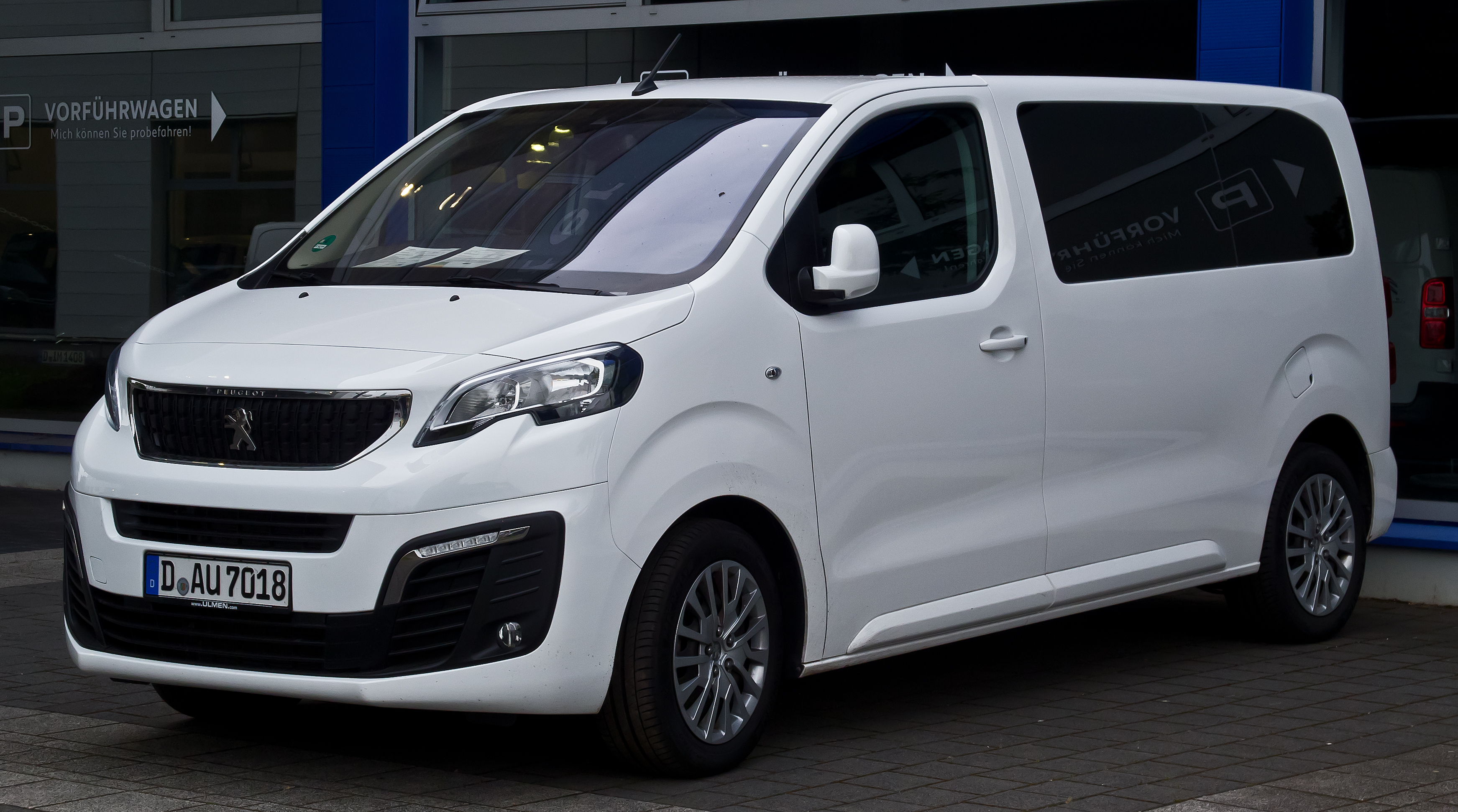 Peugeot Traveller L2 BlueHDi 95 Active